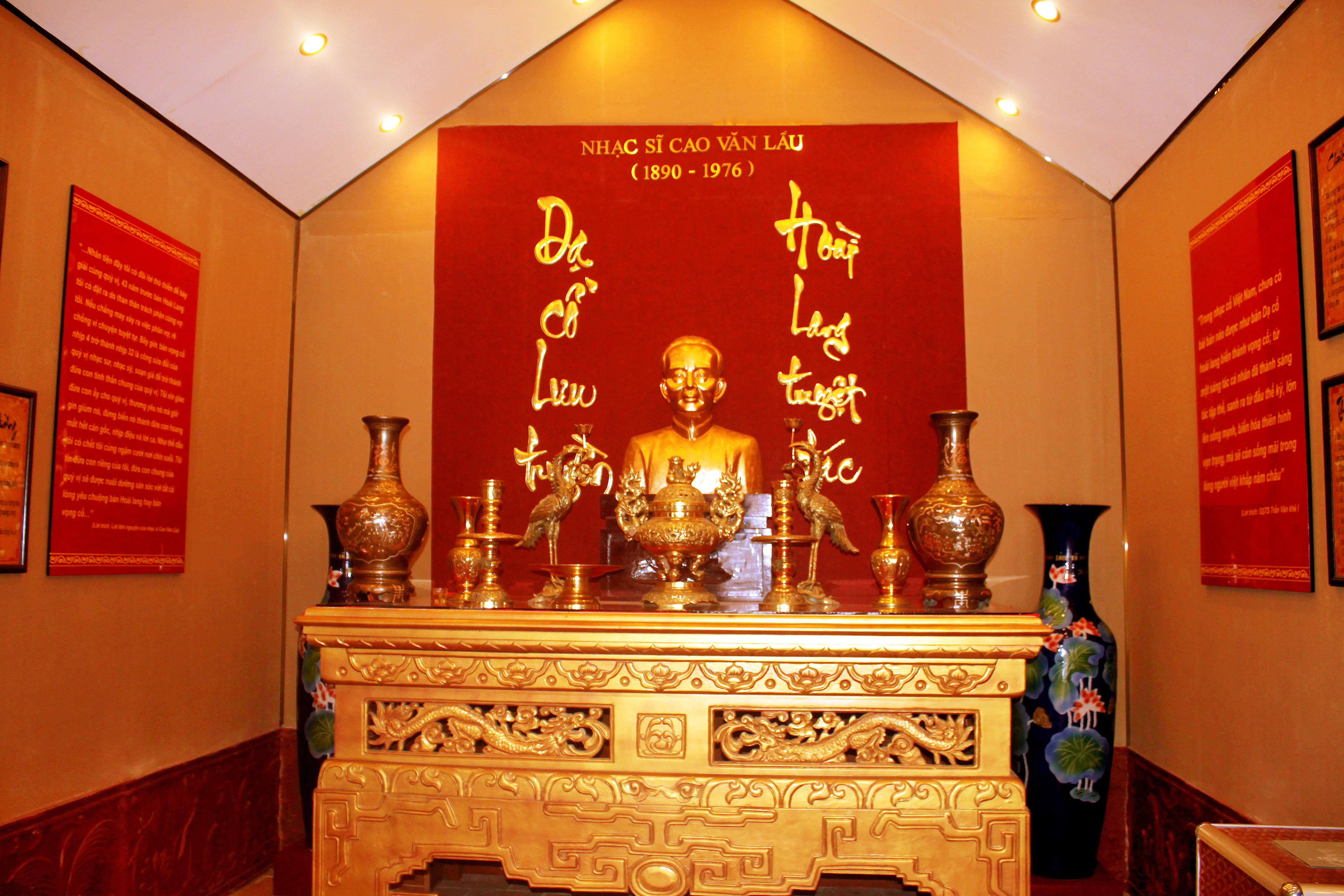 Bàn thờ Cao Văn Lầu trong Khu lưu niệm nghệ thuật Đờn ca tài tử và nhạc sĩ Cao Văn Lầu ở thành phố Bạc Liêu, tỉnh Bạc Liêu, Việt Nam